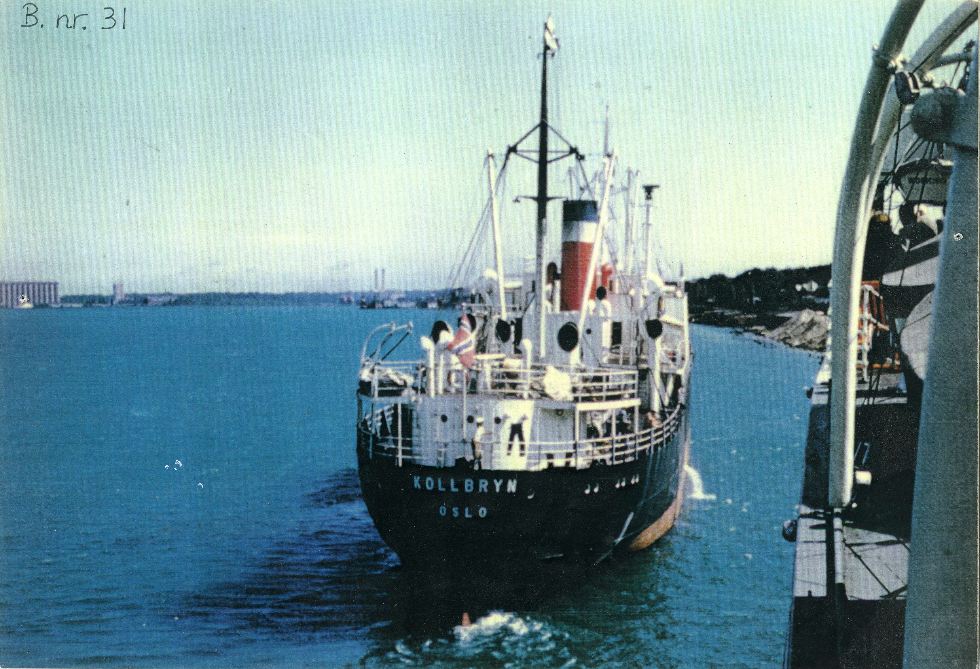 "Lake"-skipet Kollbryn. Levert 1951